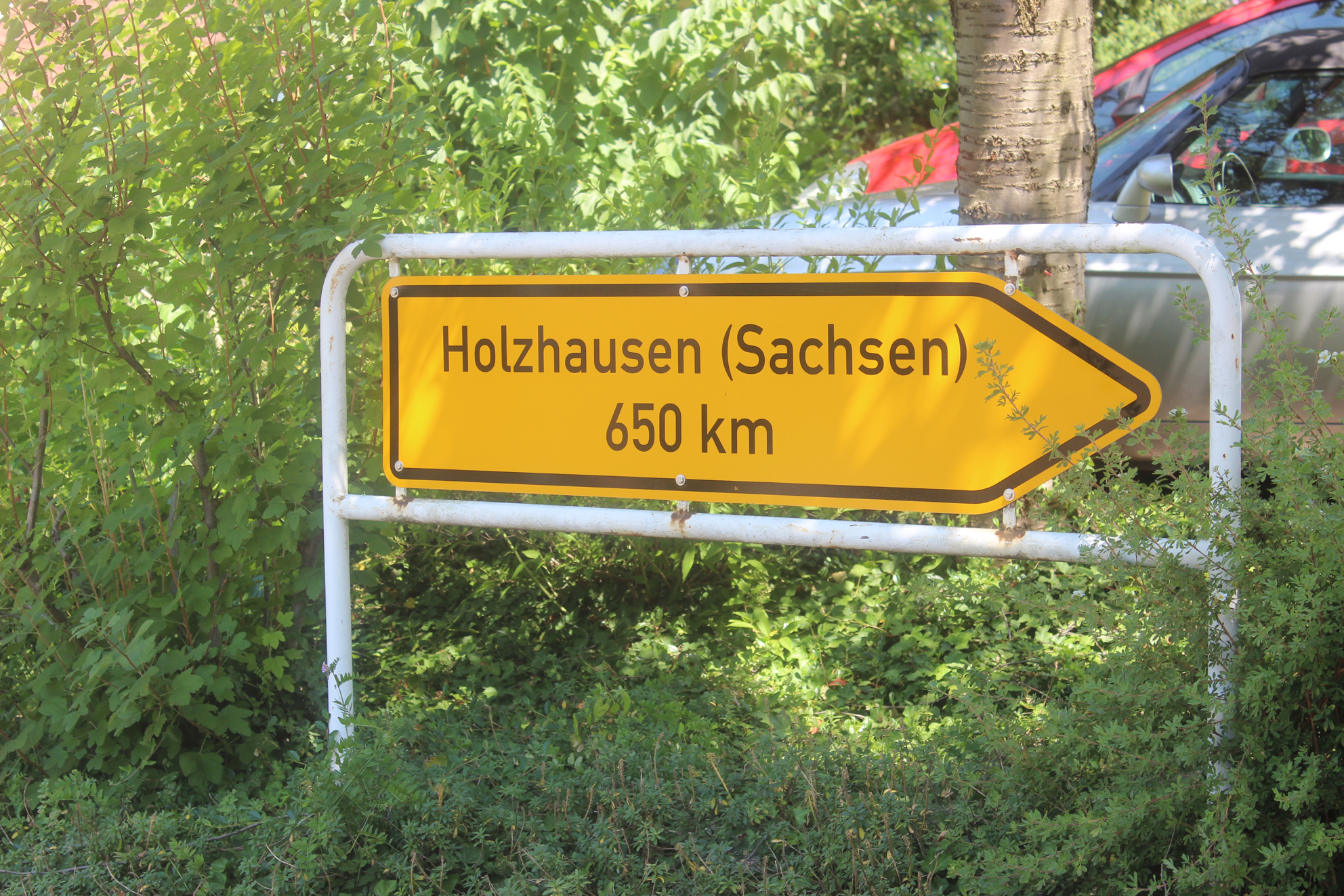 Hinweisschild in March-Holzhausen